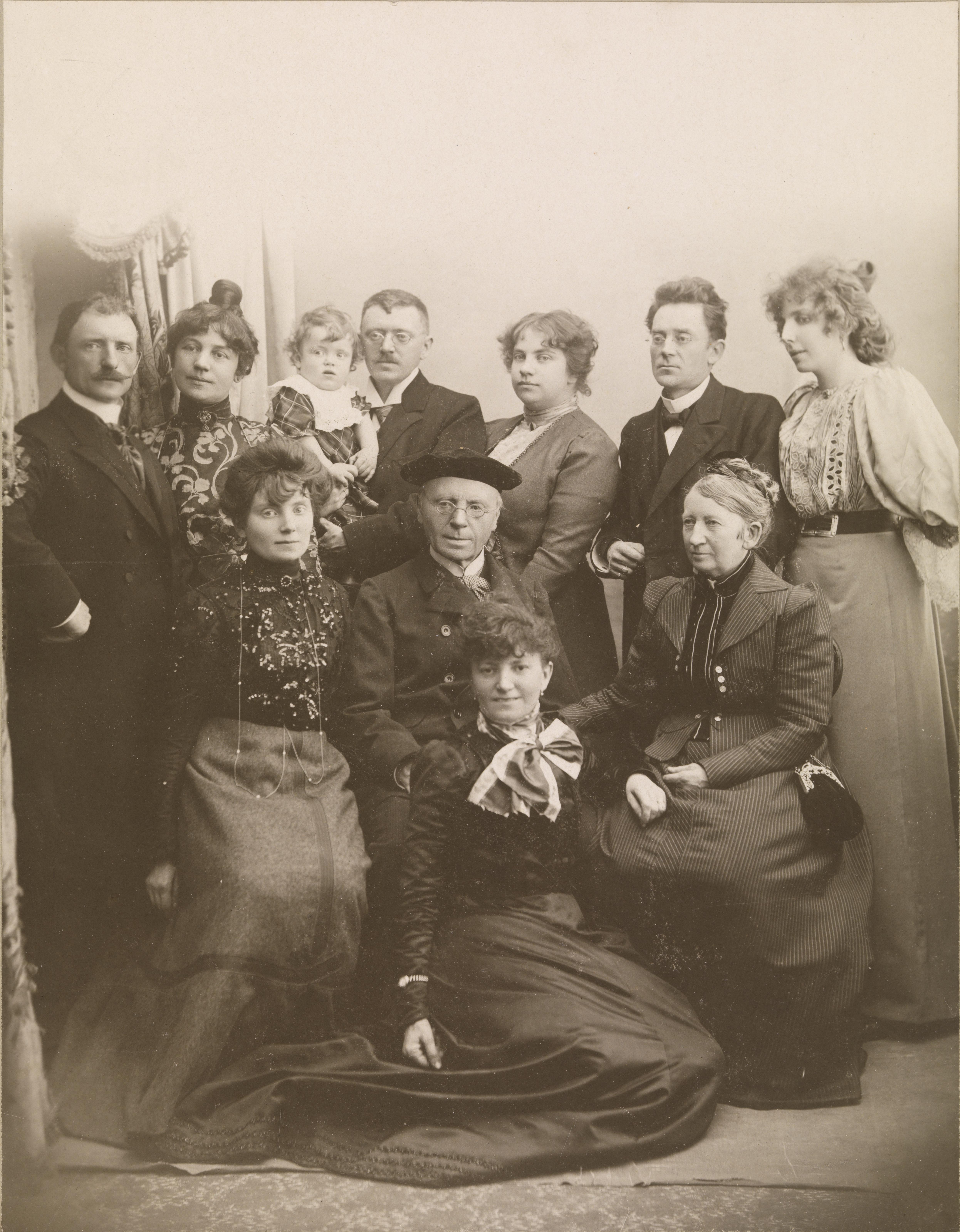 Bildet er hentet fra Nasjonalbibliotekets bildesamling Depicted person: Lie, Jonas Depicted person: Lie, Thomasine Depicted person: Lie, Mons Depicted person: Lie, Michael Depicted person: Lie, Erik Depicted person: Isaachsen, Asta Depicted person: L'Orsa, Elisabeth Depicted person: Lie, Jonas Depicted person: Lie, Annie Maggie Depicted person: Lie, Kathrine Elisabeth Depicted person: Lie, Johanne Eleonore